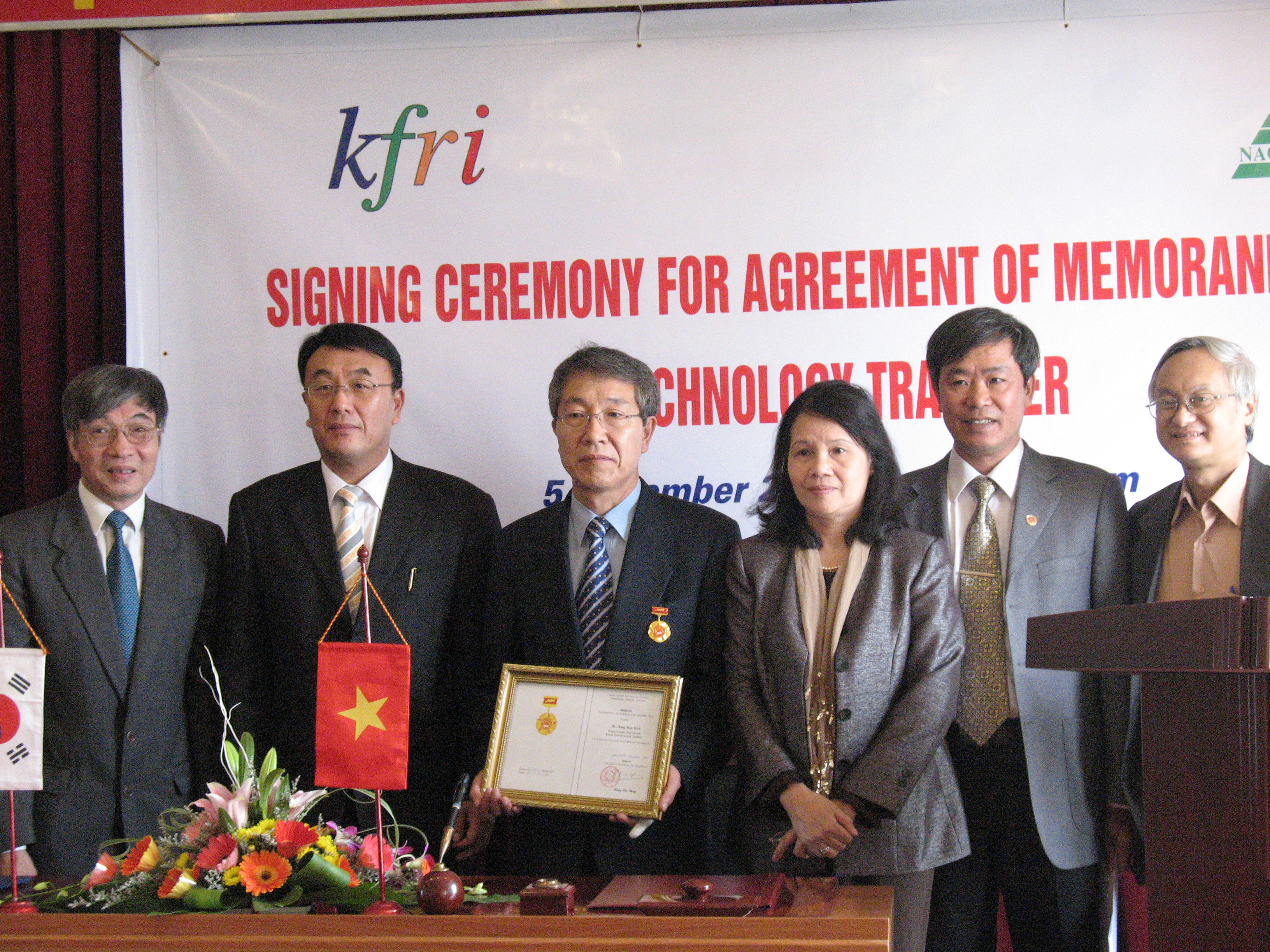 대한민국의 식품공학자 김동만(영어: Kim Dongman, 1955년 ~ ). According to Commons:OTRS, I have received permission from the author(Kim Dongman) to upload the image to Commons under a free license. Evidence of consent. Choe Kwangmo.